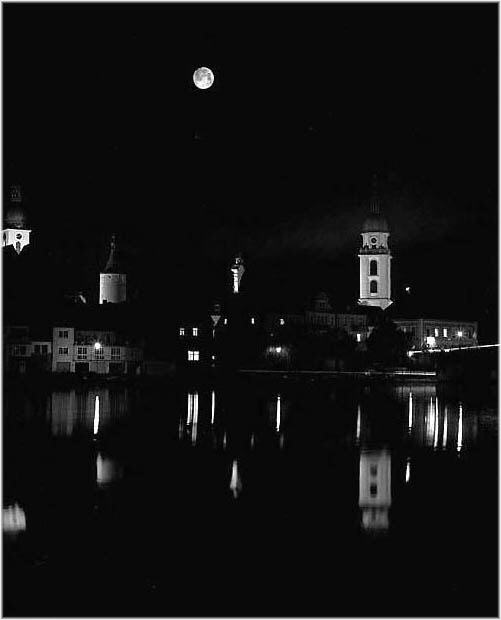 Kitzinger Uferpromenade bei Nacht